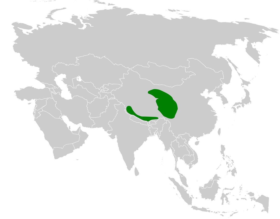 Melanocorypha maxima distribution map, based on